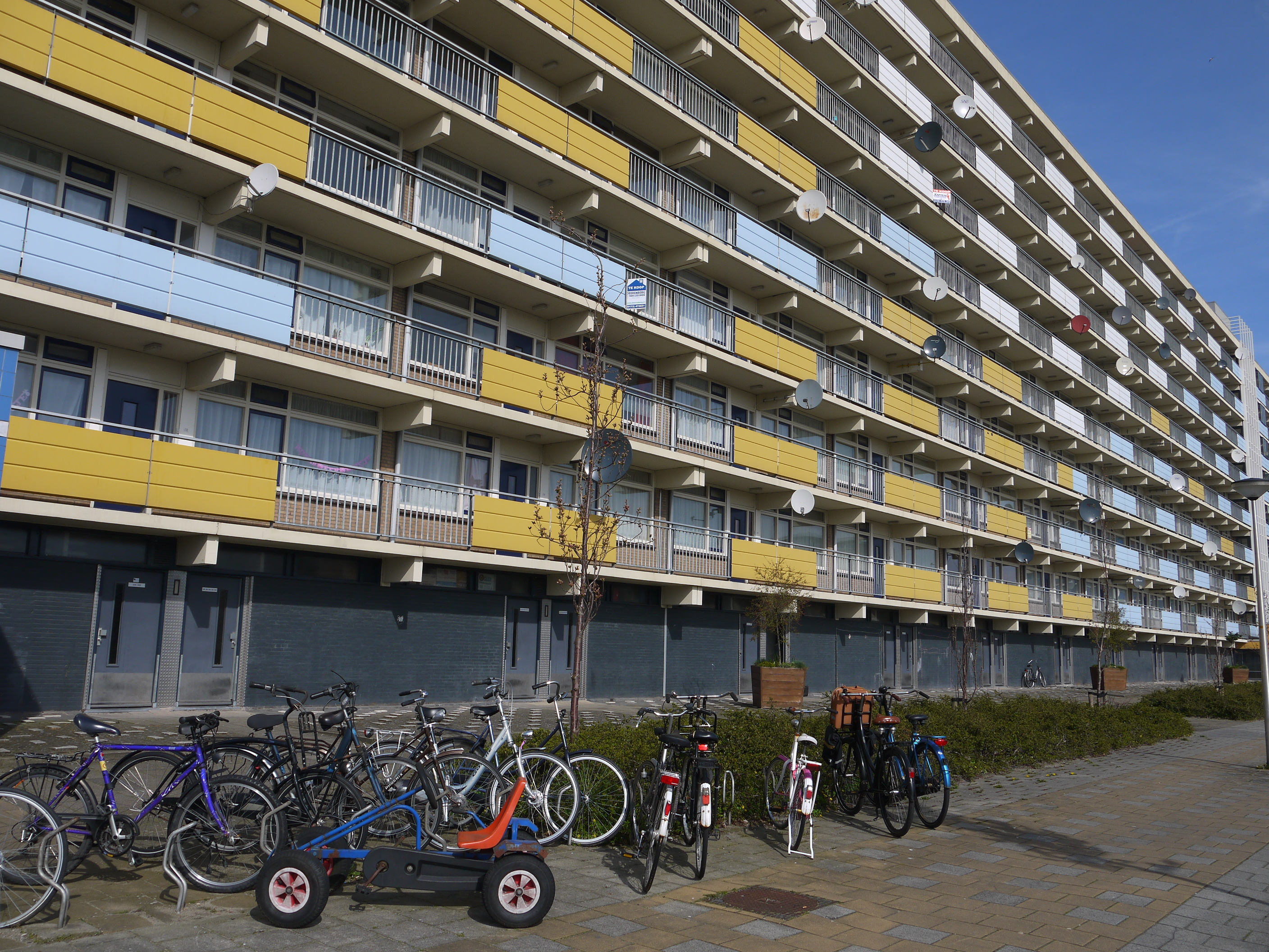 Alphen a/d Rijn